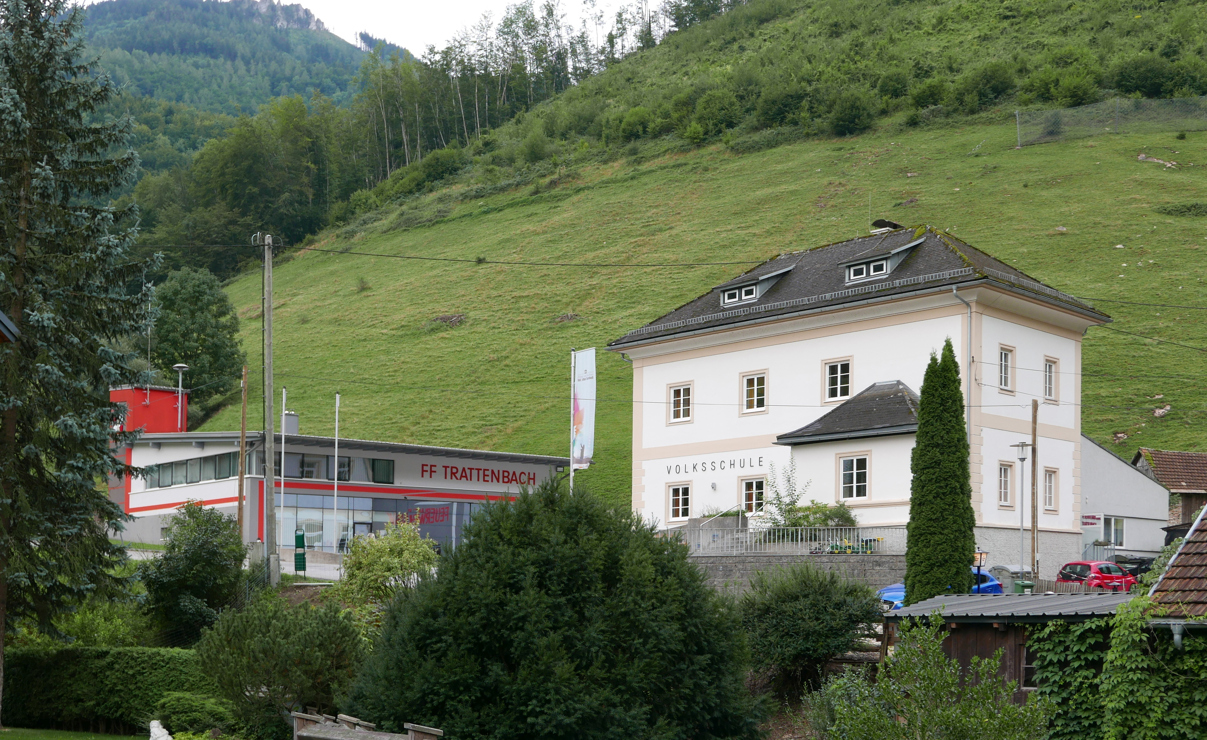 Ehemalige Volkschule in Trattenbach (heute Kultur- und BIldungseinrichtung), neues Feuerwehrgebäude (links)